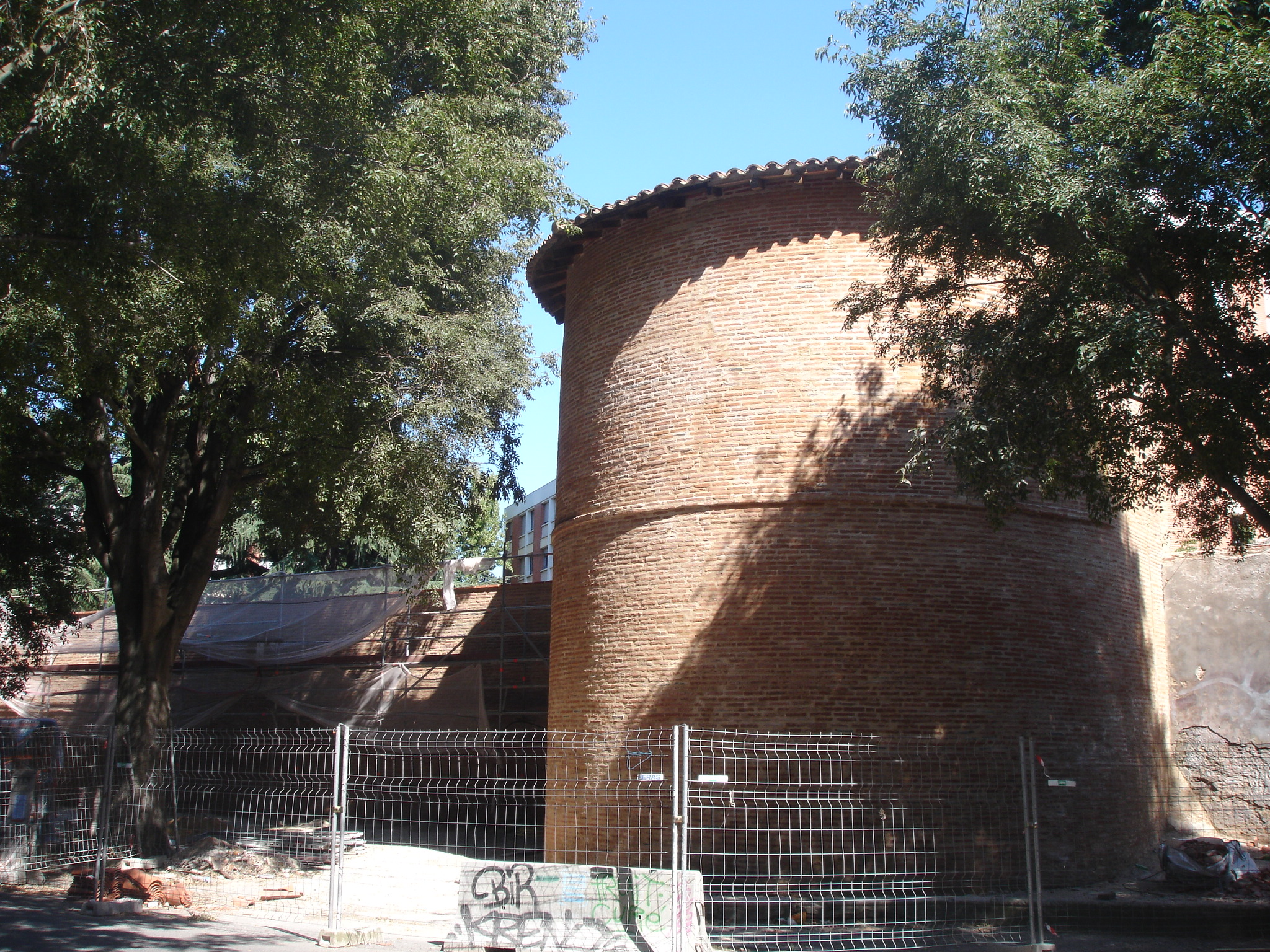 France, Haute-Garonne (31), Toulouse, remparts médiévaux